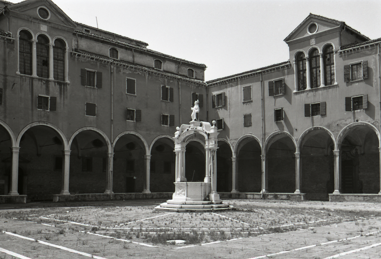 Servizio fotografico : Venezia, 1968 / Paolo Monti. - Strisce: 7, Fotogrammi complessivi: 38 : Negativo b/n, gelatina bromuro d'argento/ pellicola ; 35 mm. - ((I fotogrammi hanno una doppia numerazione. . - Sul portanegativi: Nikon Agfa 21. - Sul dorso del portanegativi Monti specifica: "Muri - pietre scolpite". - Probabilmente questa specifica in penna biro rossa si riferisce a ricerche personali che esulano dal contesto del servizio commissionato da Electa. - Occasione: Pubblicazione: "Edoardo ARSLAN, Venezia gotica: architettura civile gotica veneziana, Milano, Electa, 1970". - Fonte: Agenda di Paolo Monti: Venezia Architettura Gotica Civile / Ed. Electa maggio/giugno 1968 (1968/05-1968/06), presso Archivio Paolo Monti